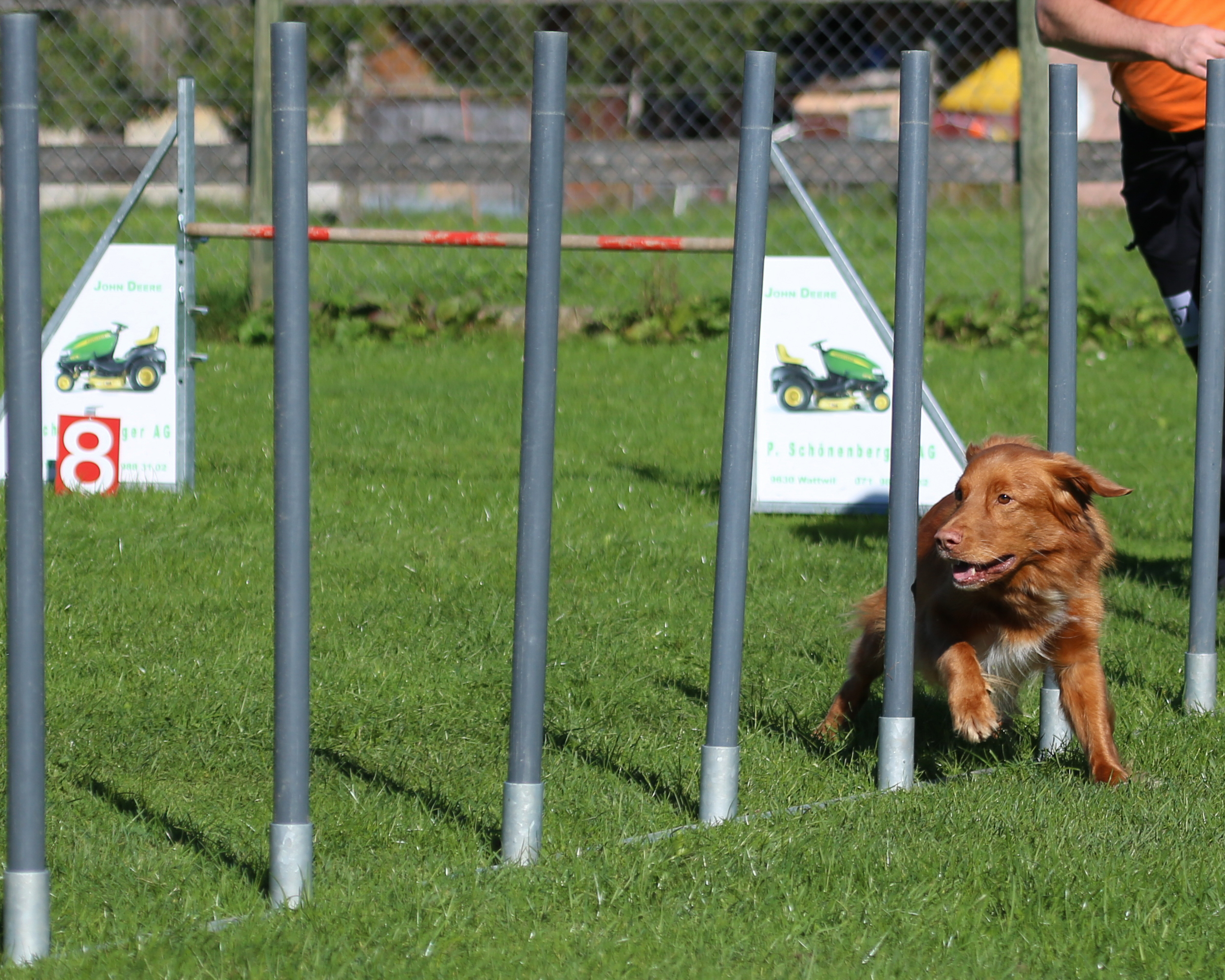 Agility-Wettkampf in der Ostschweiz – Toller beim Slalom